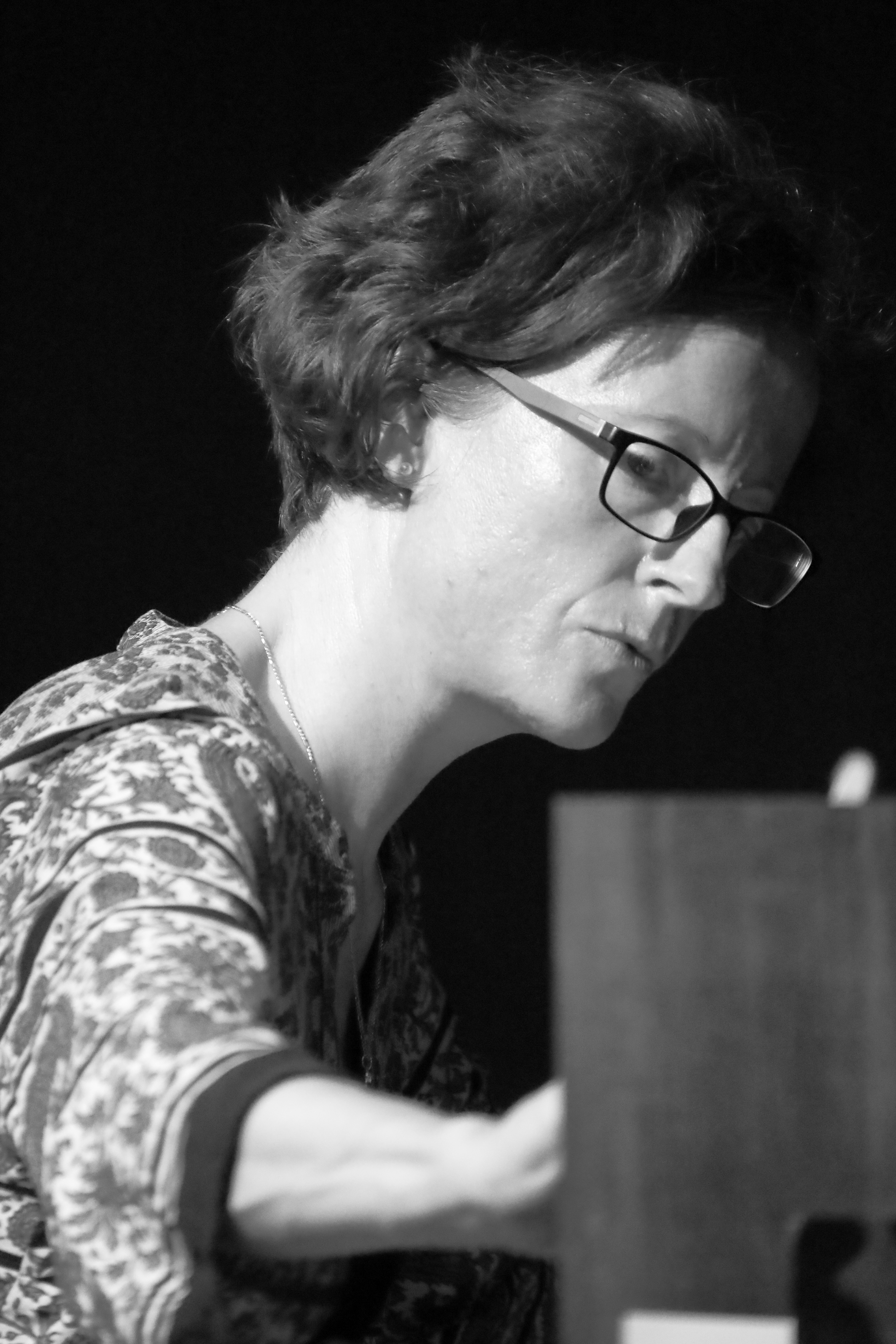 Das Trio Tanja Feichtmair (sax), Elisabeth Harnik (p) & Nina Polaschegg (db) im Konzert im Club W71, Weikersheim.